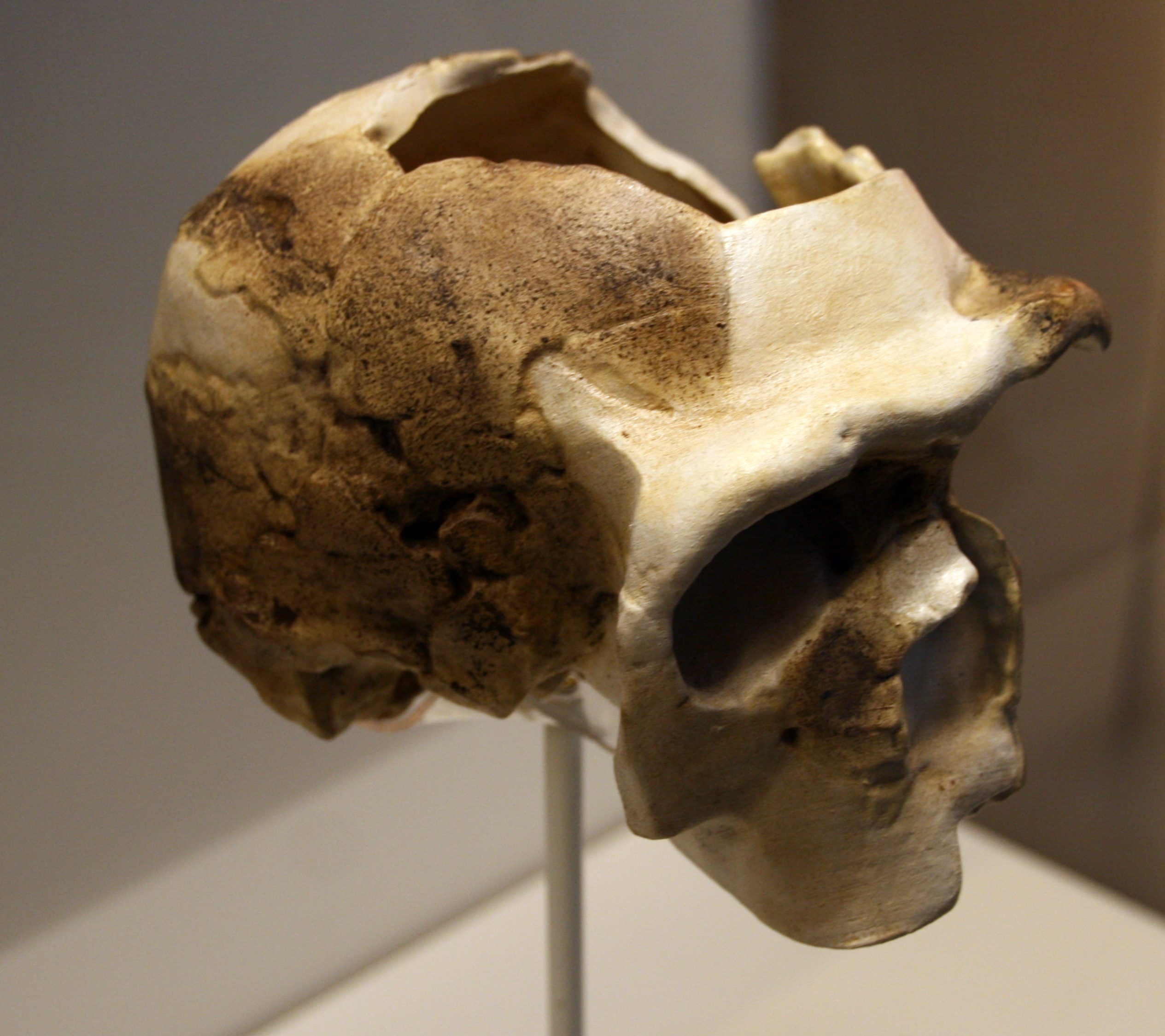 Fósil Nduru. Homo rhodesiensis. Réplica Exhibido en exposición temporal, "La cuna de la humanidad", en el Museo Arqueológico de Regional de Madrid